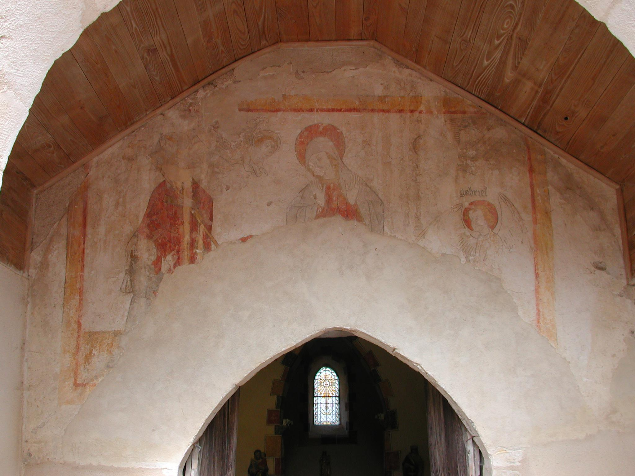 Église Saint-Aignan de Bègues (Allier). Peinture murale de l'Annonciation, sous le porche.